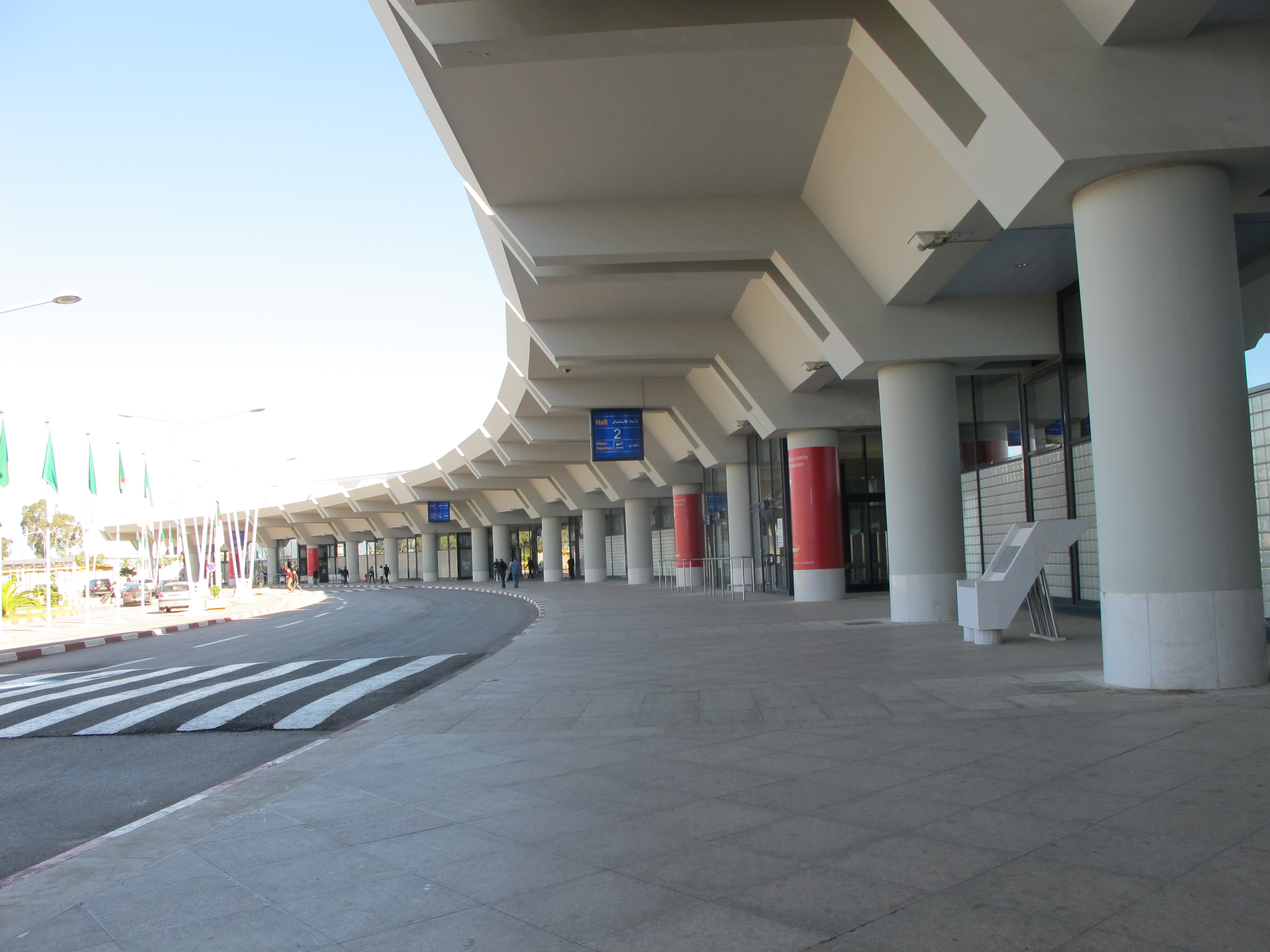 Aéroport Houari Boumediene, Dar El Beida, Alger, Algérie (nouvel aérogare)